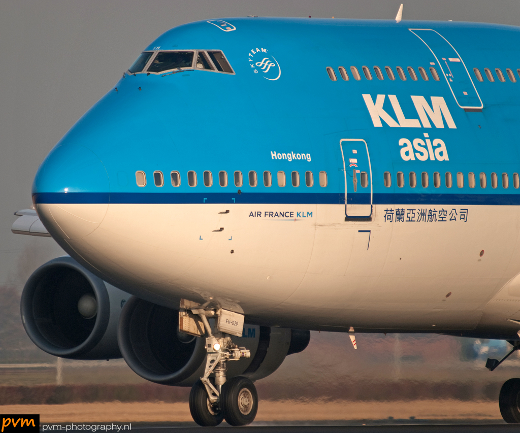 Touchdown Boeing 747-406M Amsterdam schiphol [AMS / EHAM] 30-01-2009